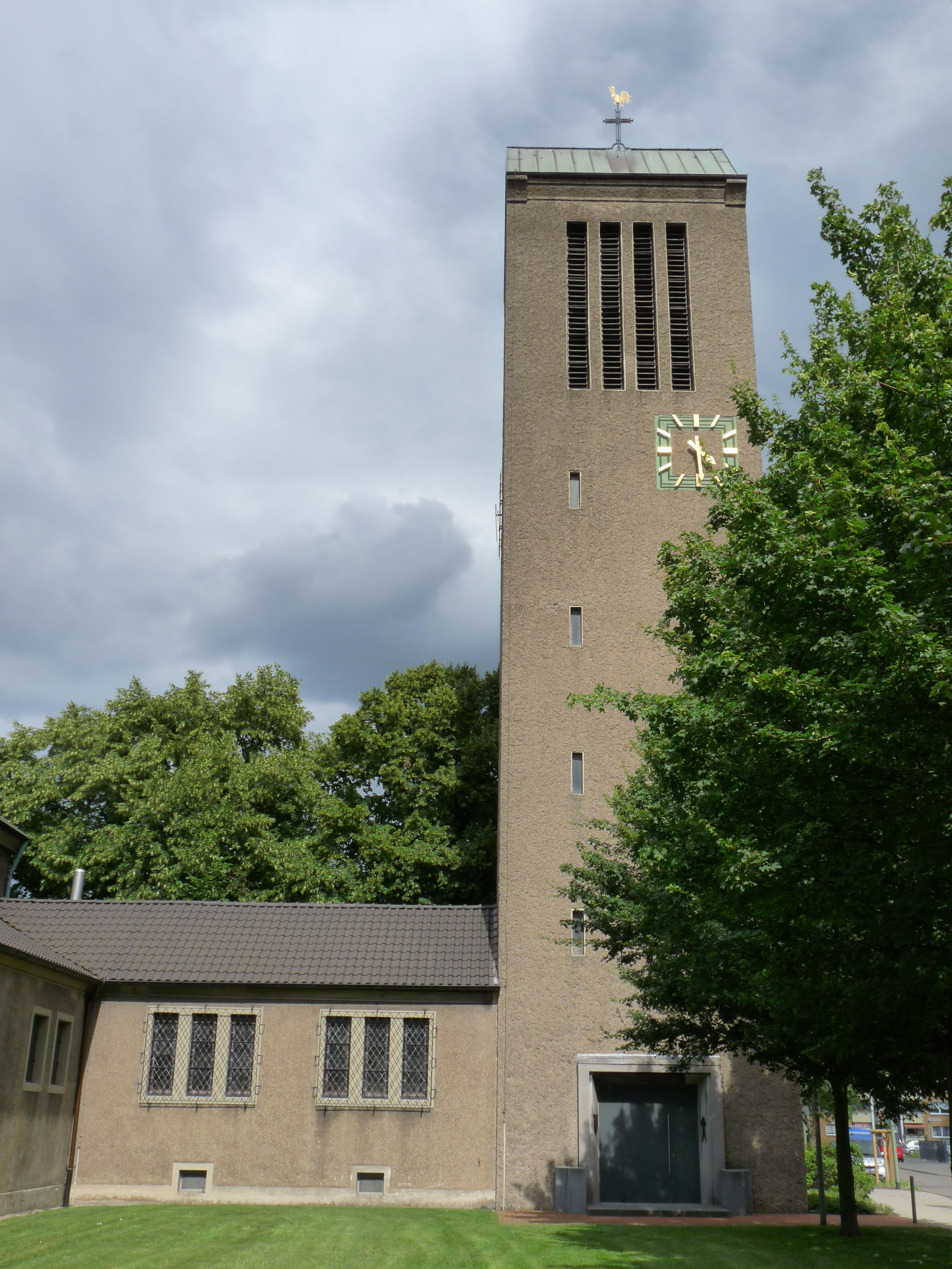 kath. Filialkirche St. Elisabeth in Duisburg-Vierlinden